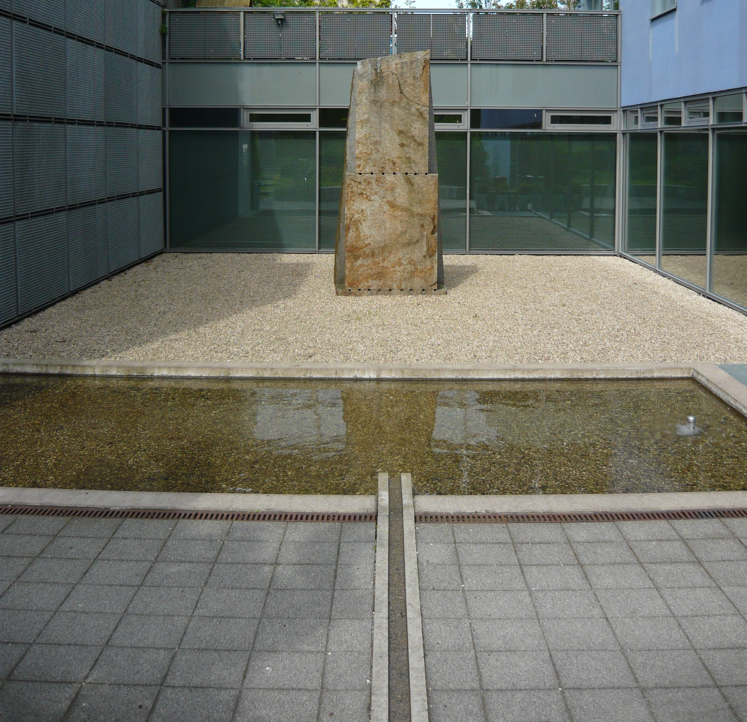 Rückriem-Stein, Evangelisches Kirchenzentrum Kronsberg, Mai 2012